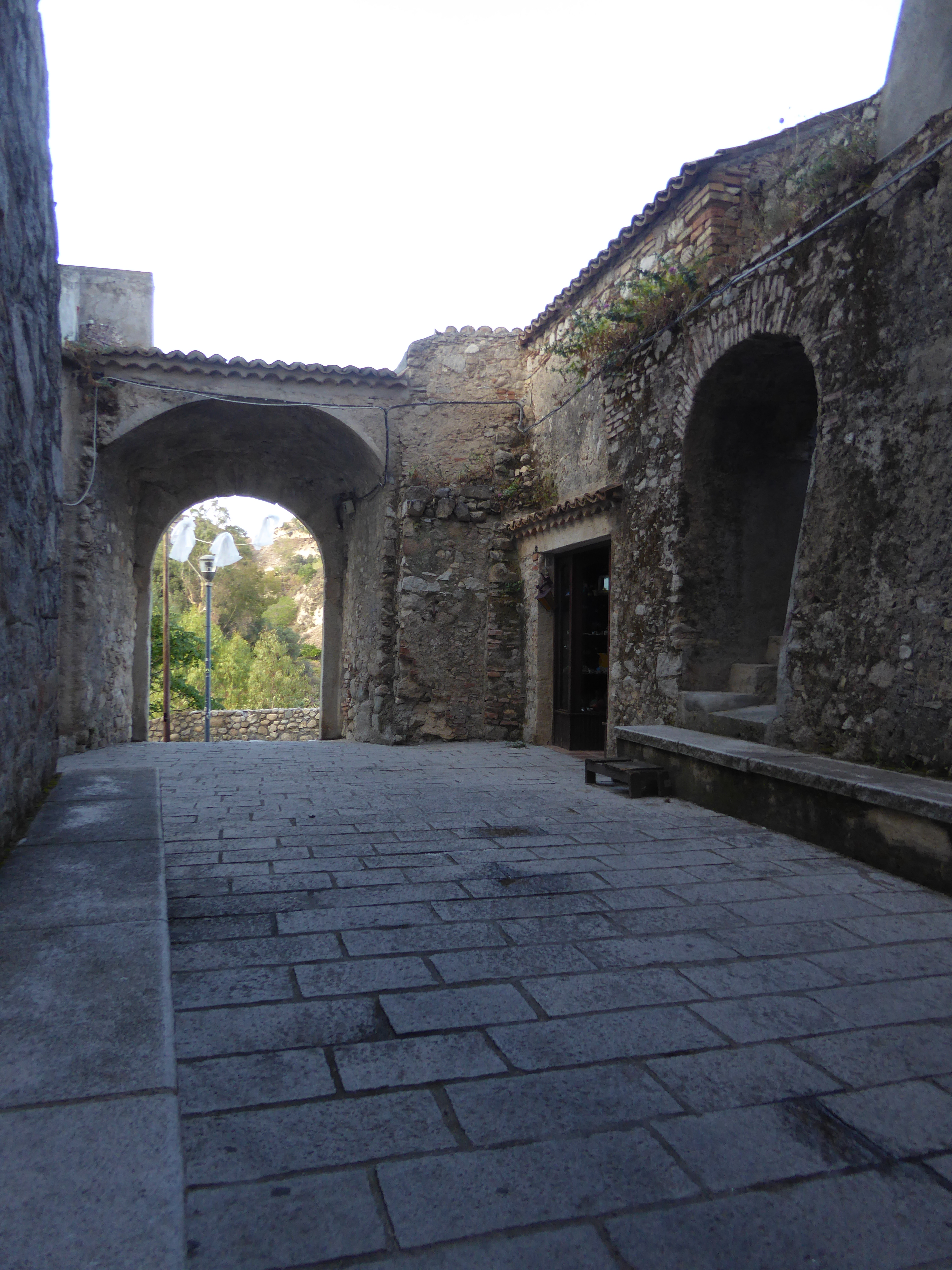 Centro Storico di Riace altra prospettiva (2018)